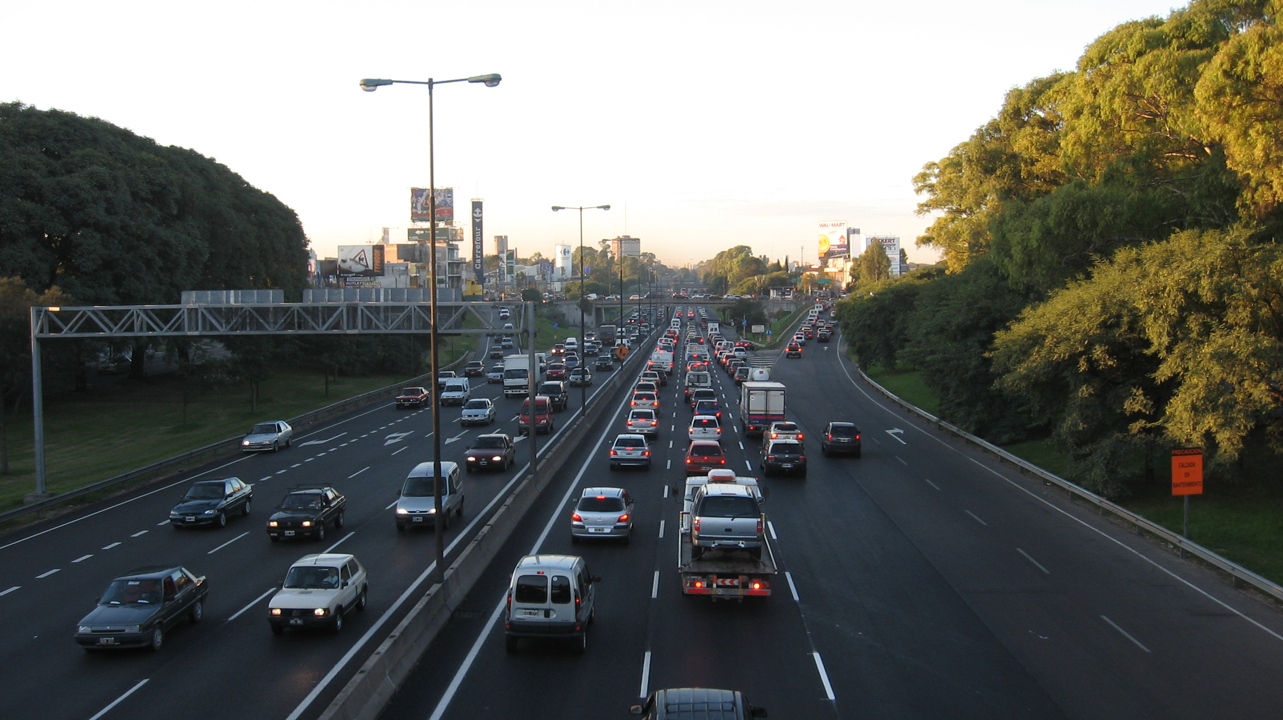 Autopista General Paz, cruce con la avenida San Martín. Foto tomada desde lo alto de un puente de peatones